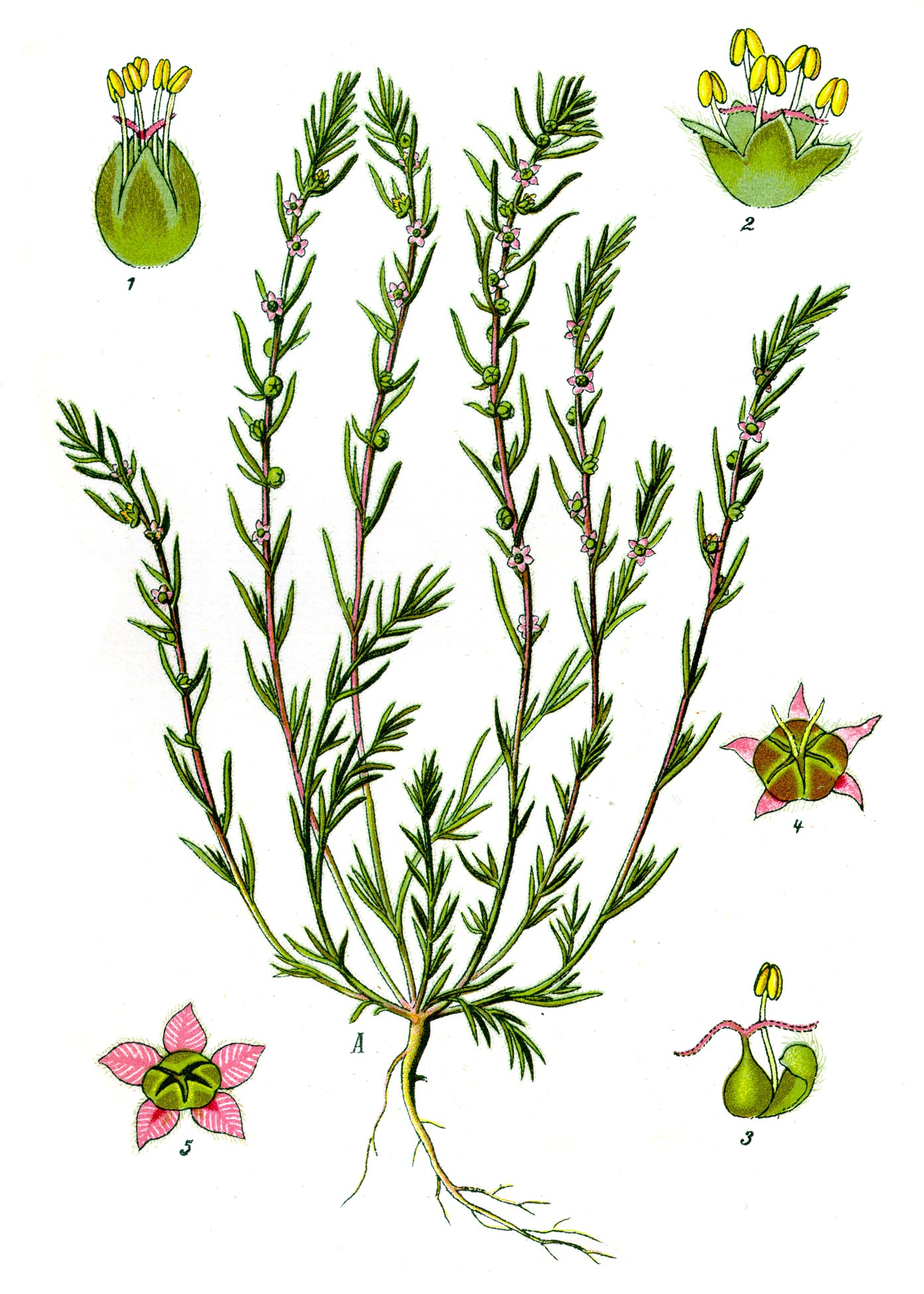 Name Bassia laniflora (S.G.Gmel.) A.J.Scott, syn. Kochia arenaria (Maerkl.) Roth ;Family:Chenopodiaceae Original book source: Prof. Dr. Otto Wilhelm Thomé Flora von Deutschland, Österreich und der Schweiz 1885, Gera, Germany Permission granted to use under GFDL by Kurt Stueber